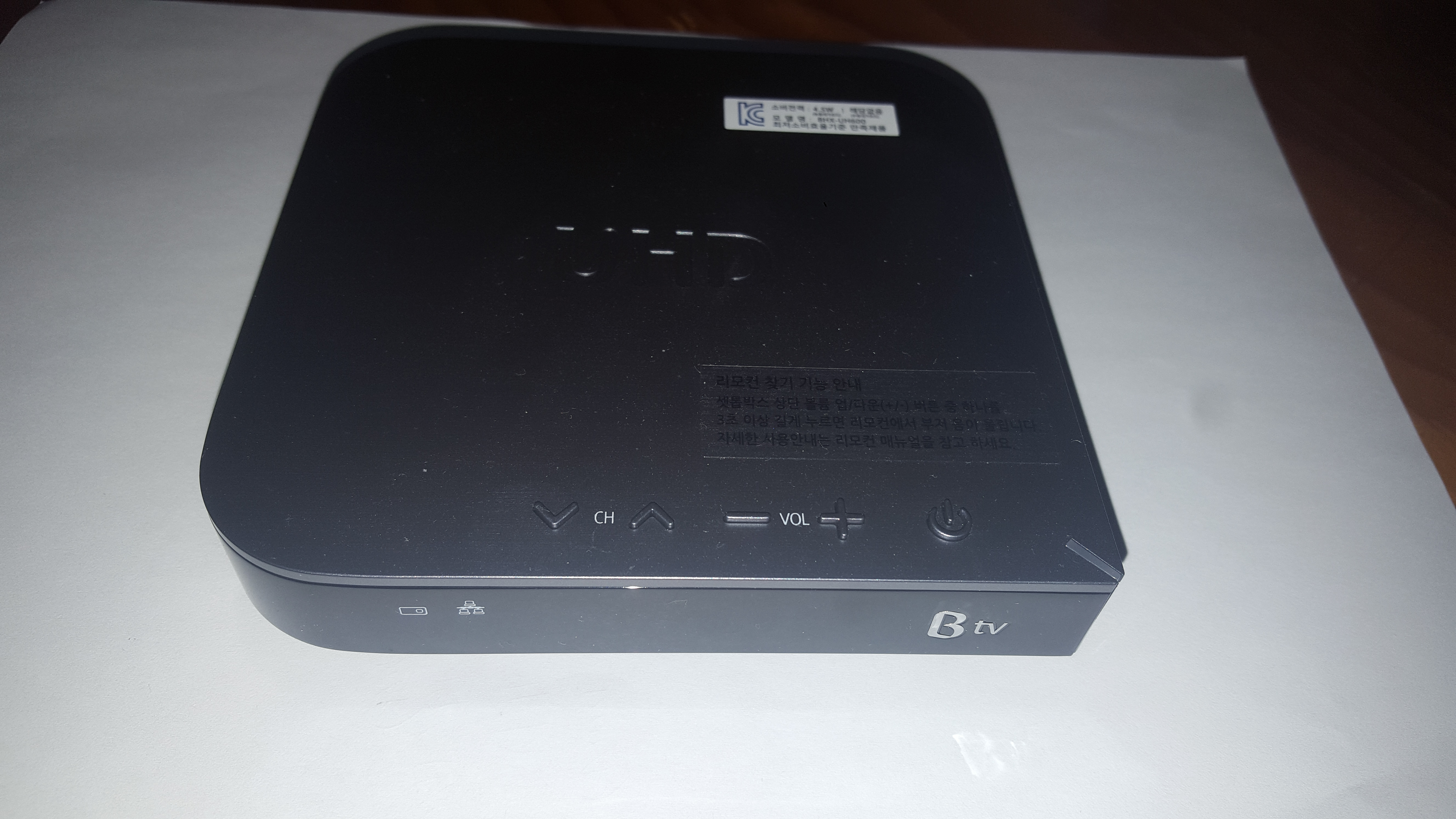 SK BTV UHD HDR STB